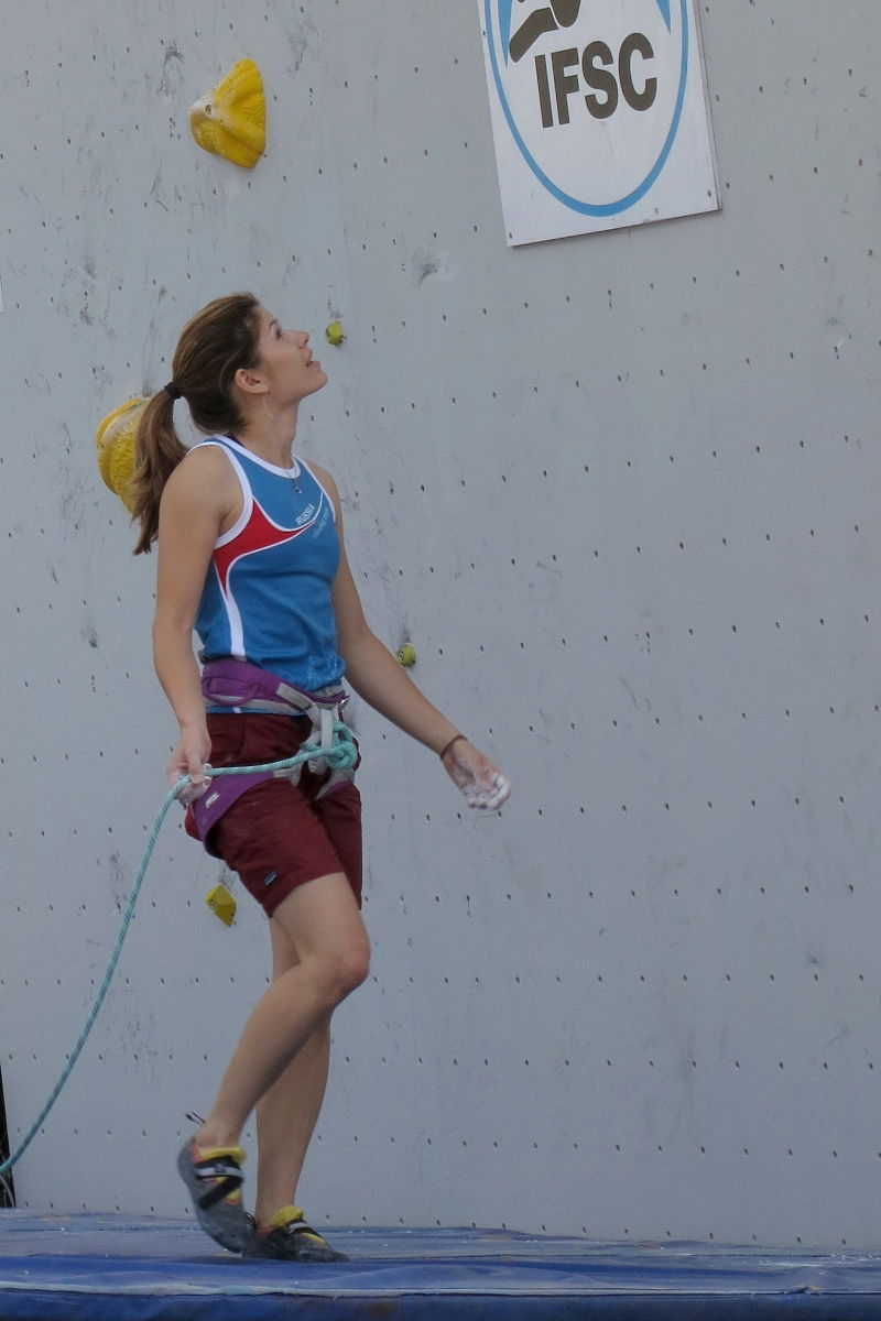 Yana Chereshneva en demi-finale du championnat d'Europe d'escalade (difficulté) 2013 à Chamonix